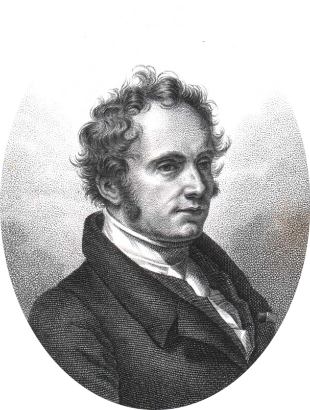 Charles-François Brisseau-Mirbel (1776-1854), French botanist.